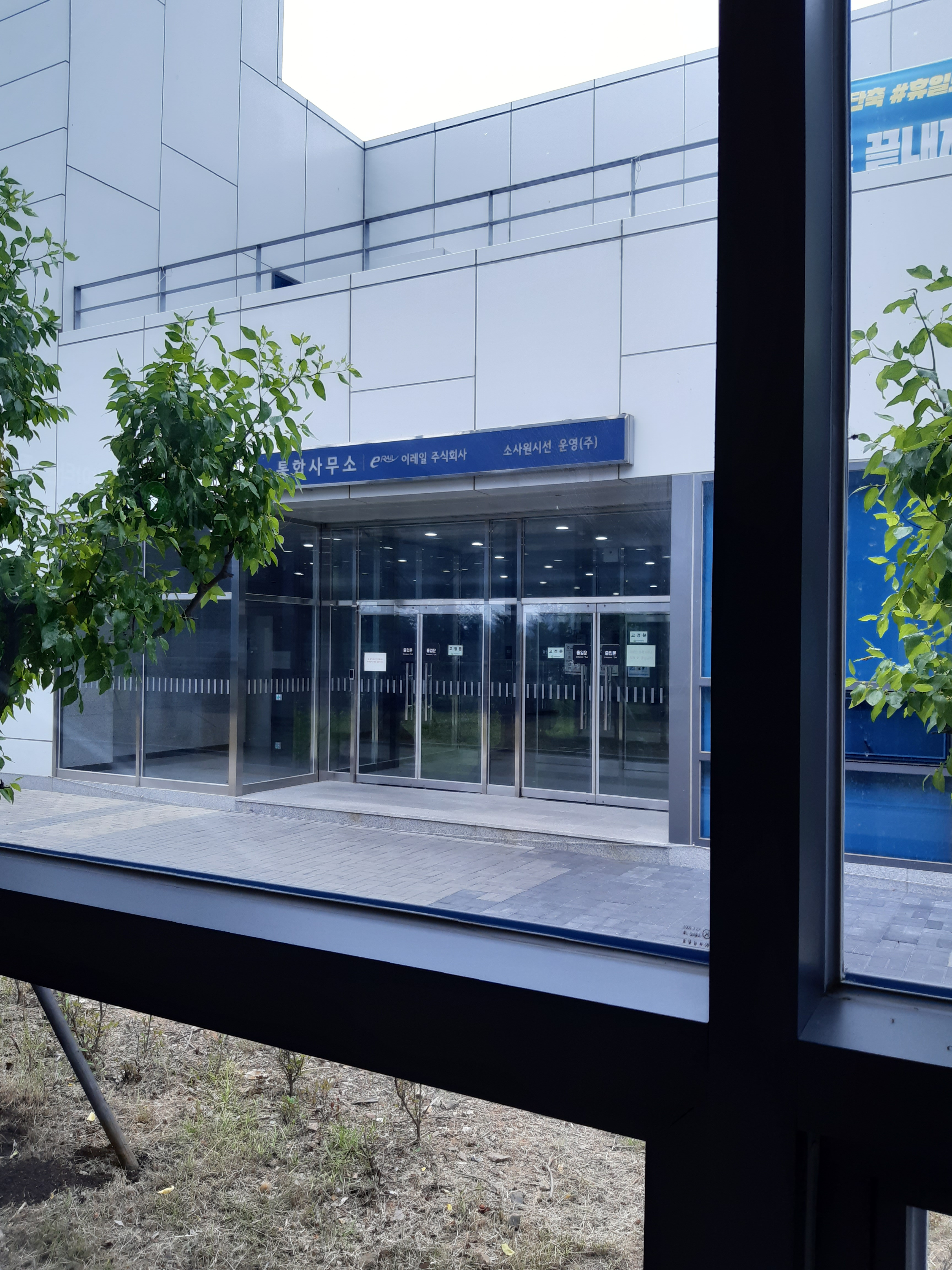 초지역 환승통로 중간에 있는 소사원시선 회사